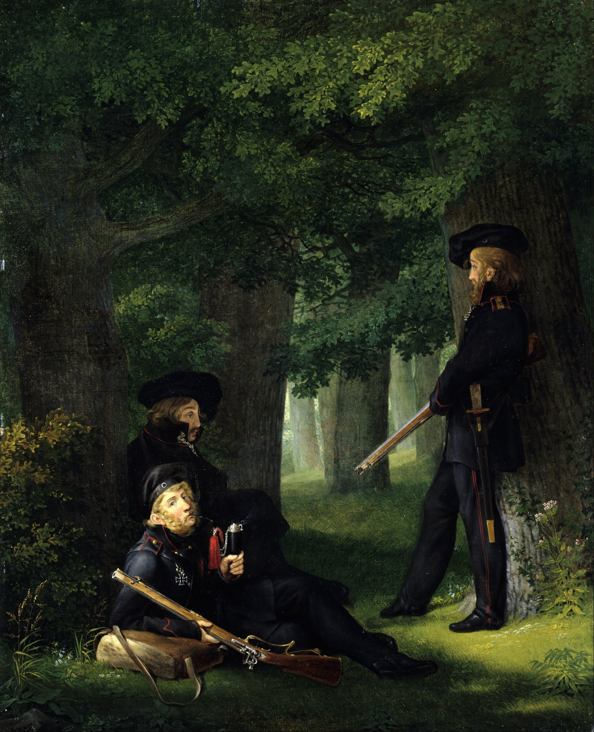 Theodor Körner, Karl Friedrich Friesen and Henry Hartmann as „Lützower Jäger“ (literally Lützow hunters).